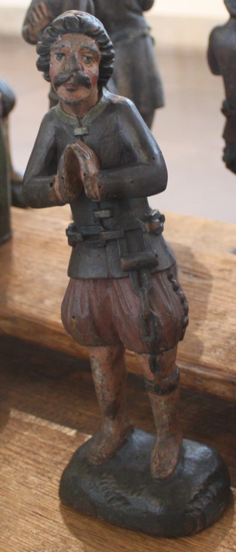 Das Foto zeigt eine sogenannte Sklavenfigur aus der Zeit der Hamburgischen Konvoischiffahrt (17./18. Jahrhundert). Die Figuren sollten zur Spendenbereitschaft der Bürger beitragen und an das Schicksal versklavter Hamburger Seeleute erinnern